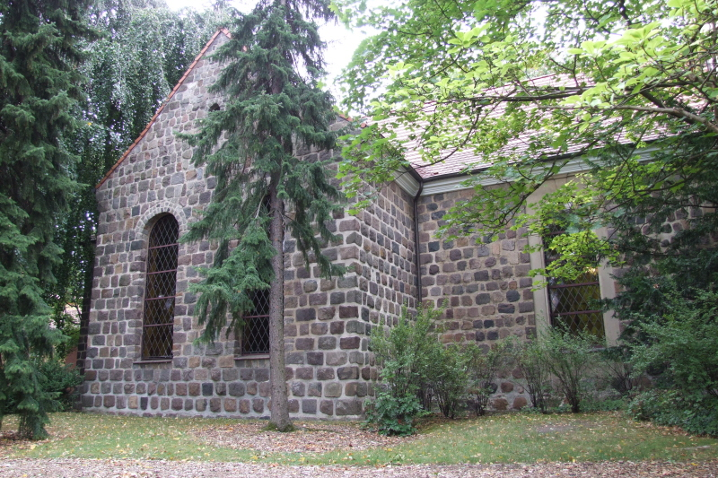 Dorfkirche in Berlin-Rudow Fotograf: Harald Rossa Datum: Juni 2006 Höher aufgelöste Version ist verfügbar